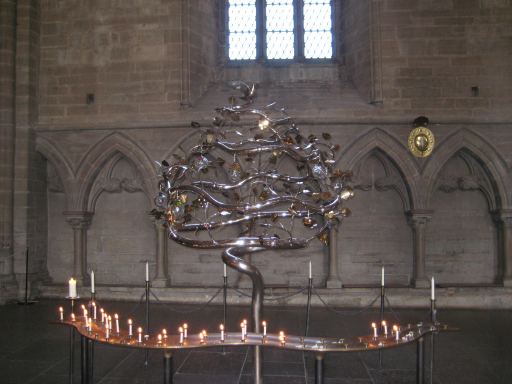 World_tree_linkoping.png: Світове дерево. Лінчепінг. Кафедральний собор.